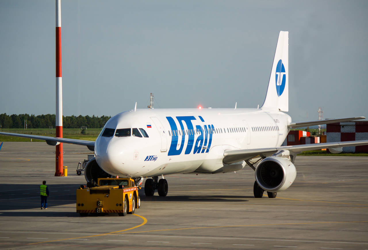 Международный аэропорт Казань